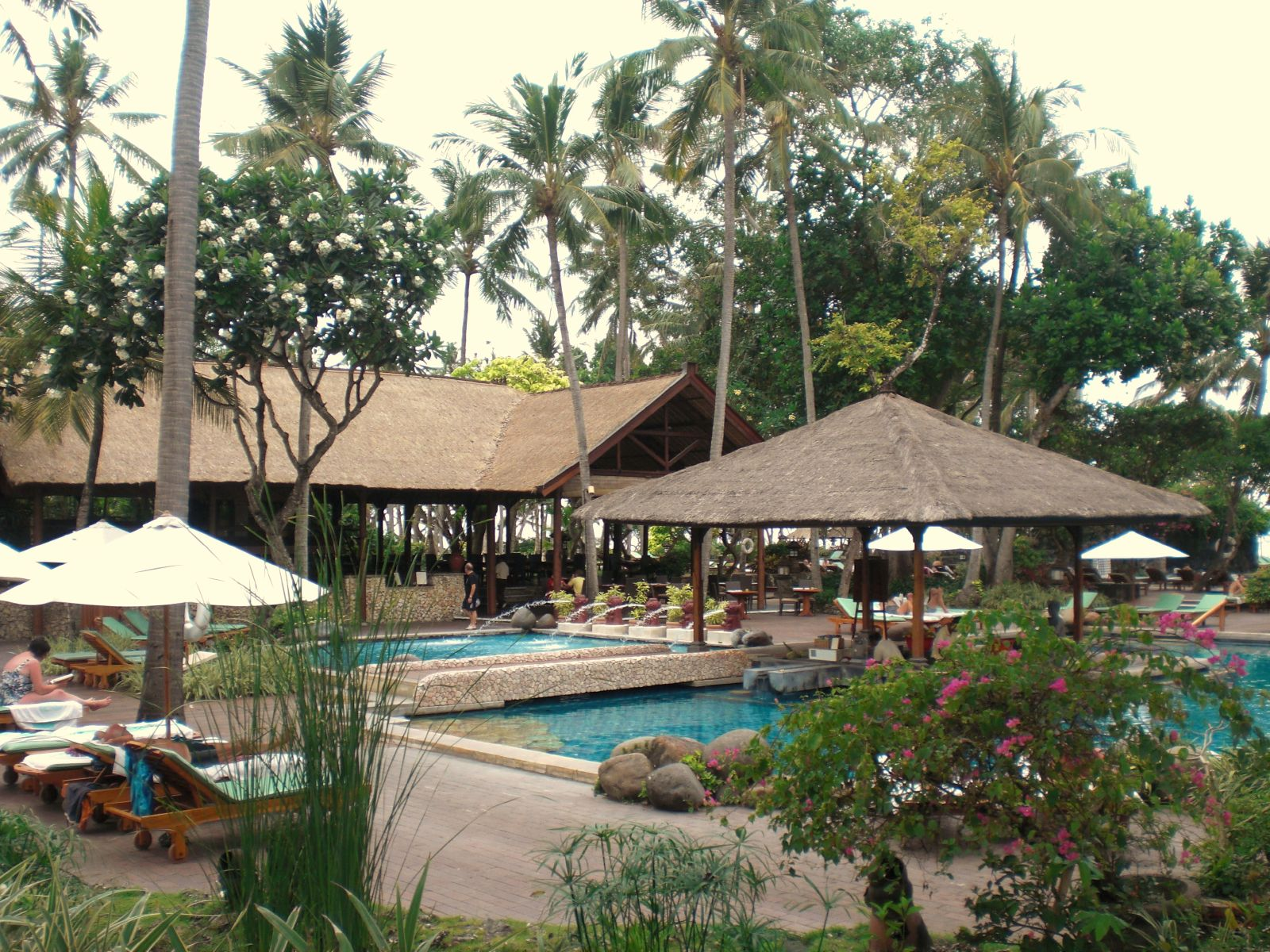 Bali Hyatt